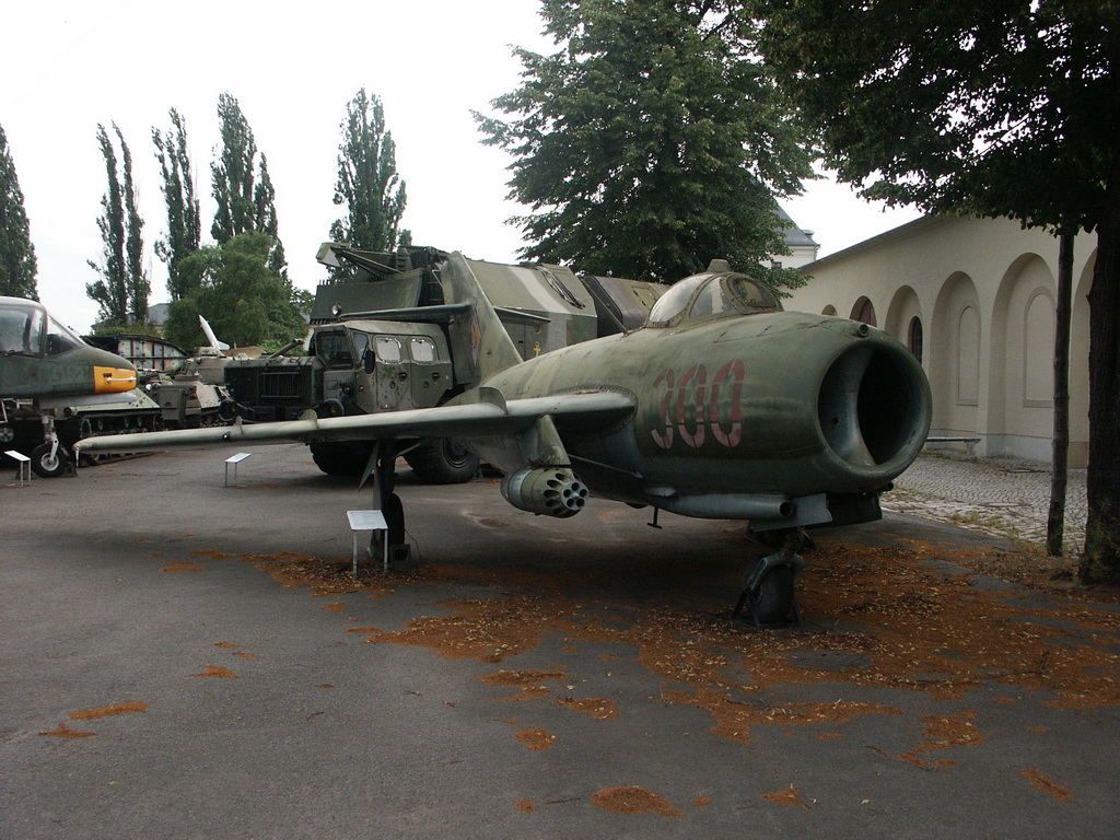 Bundeswehrmuseum Dresden mit Teilen von der NVA Remark: Mikoyan-Gurevich MiG-17. :Comment: this is apparently Polish-built attack variant Lim-6bis, armed with two Mars-2 57 mm rocket pods